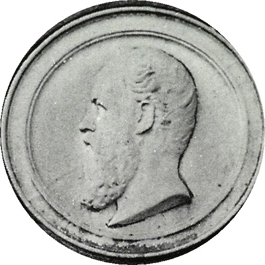 Bildnismedaillon Wilhelm Rösch, Bronzerelief eines unbekannten Bildhauers vom Grabmal Wilhelm Röschs, das ursprünglich in Stuttgart auf dem Pragfriedhof aufgestellt war. Das Grab wurde 1962 zurückgegeben. Über den Verbleib des Grabsteins und des Medaillons ist nichts bekannt.